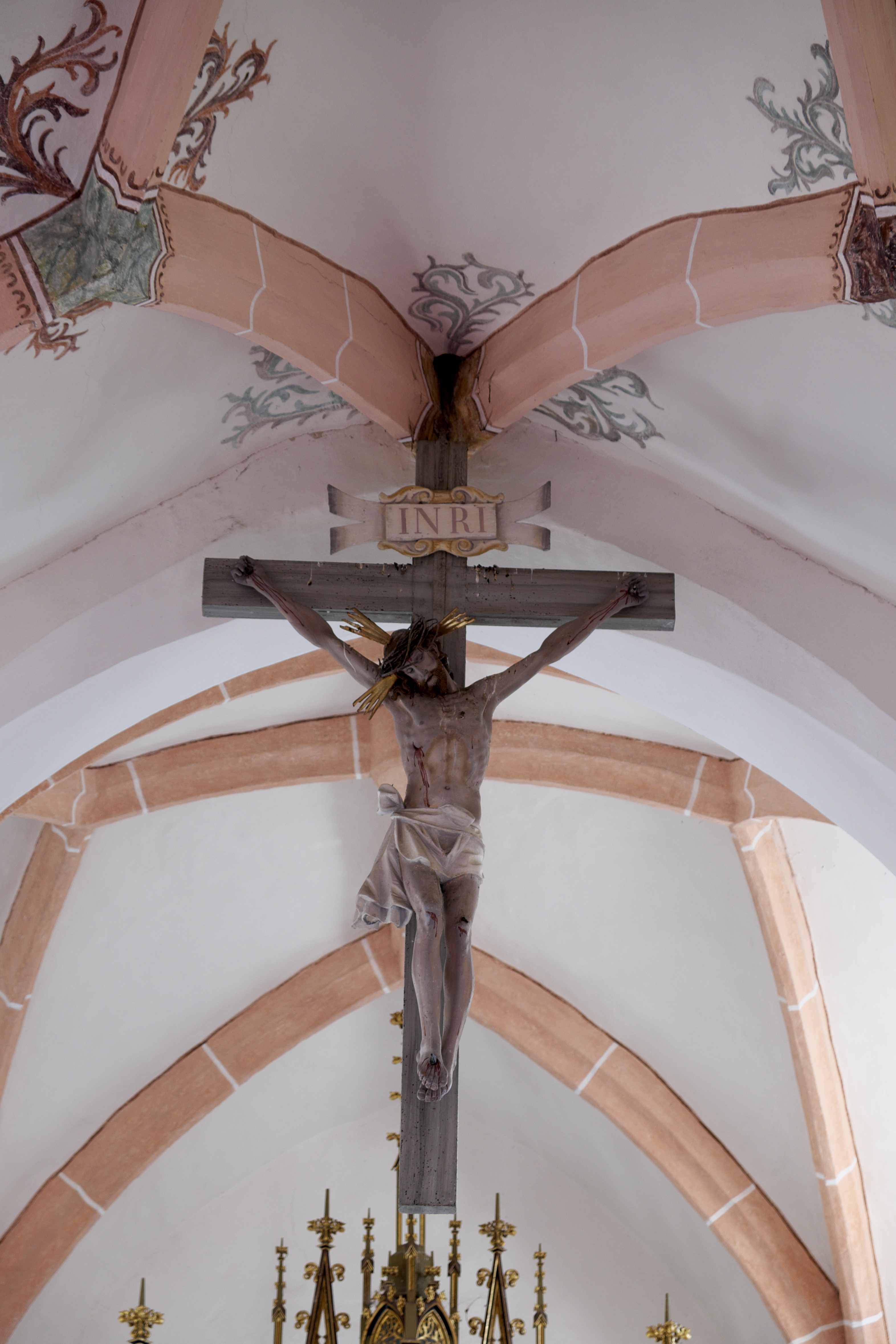 Katholische Filialkirche St. Rupertus in Gaden (Waging am See) im Landkreis Traunstein (Bayern/Deutschland), Chorbogenkreuz aus der ersten Hälfte des 17. Jahrhunderts